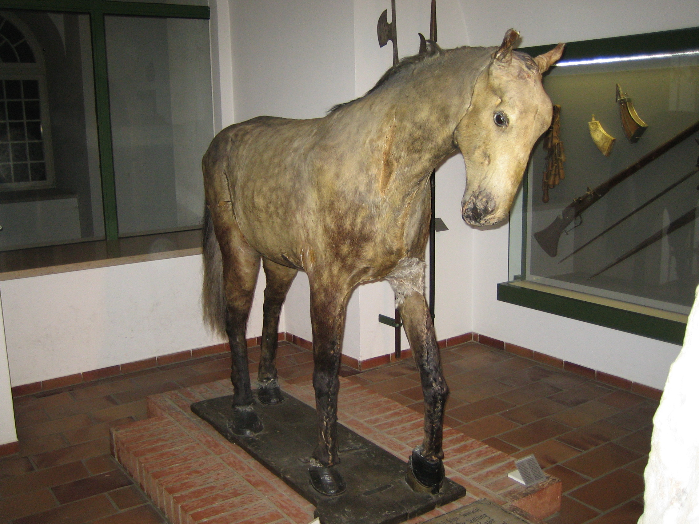 Der Schwedenschimmel, das Pferd des schwedischen Königs Gustav Adolf, das ihm bei der Belagerung Ingolstadts unter dem Hintern weggeschossen wurde. Es ist heute im Stadtmuseum zu sehen, da es nach dem Abzug der Schweden in die Stadt geholt wurde. Der „Schwedenschimmel“ gilt als ältestes erhaltenes Tierpräparat Europas.